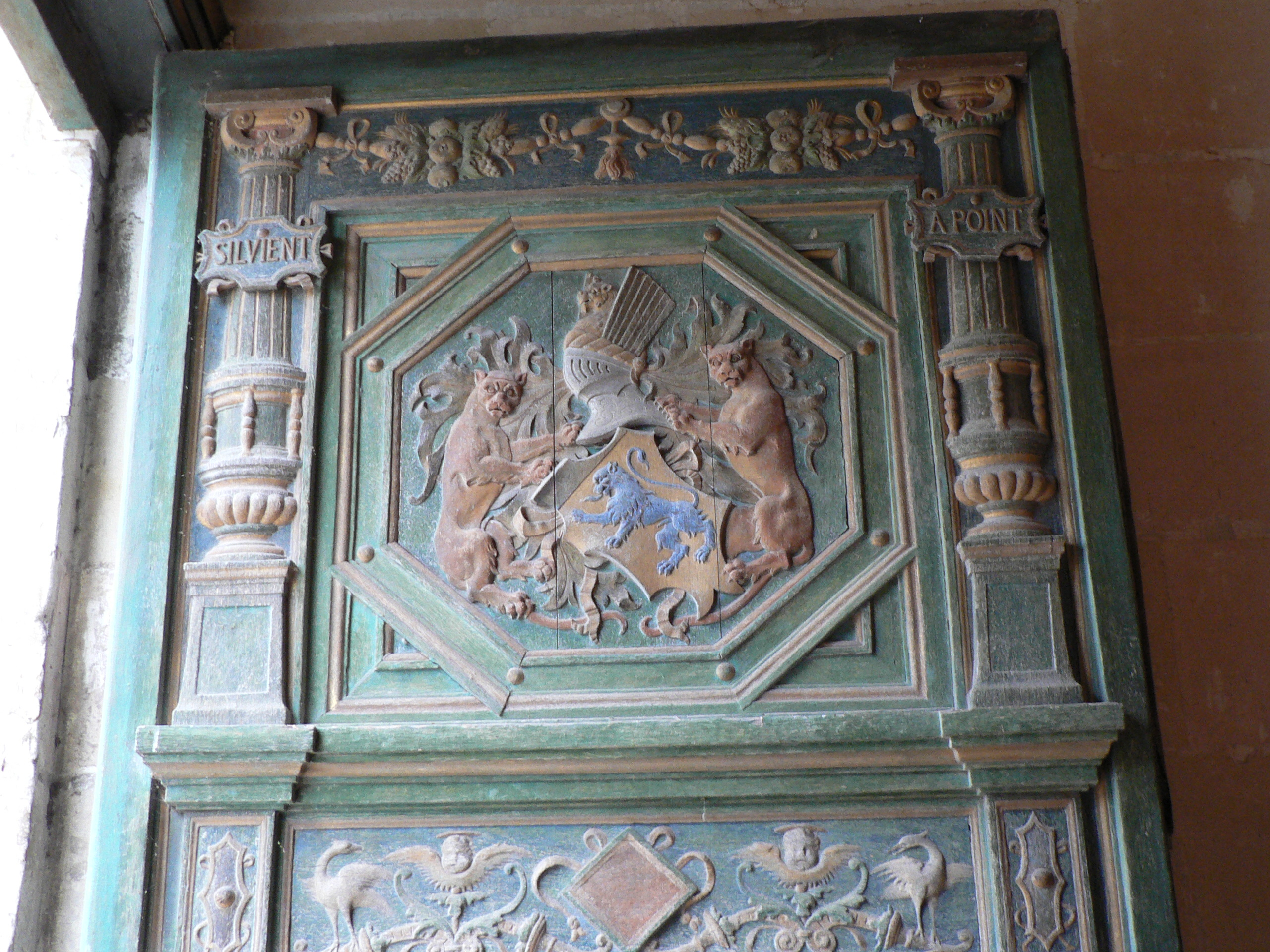 Le Château de Chenonceau, la porte d'entrée; armes de Thomas Bohier